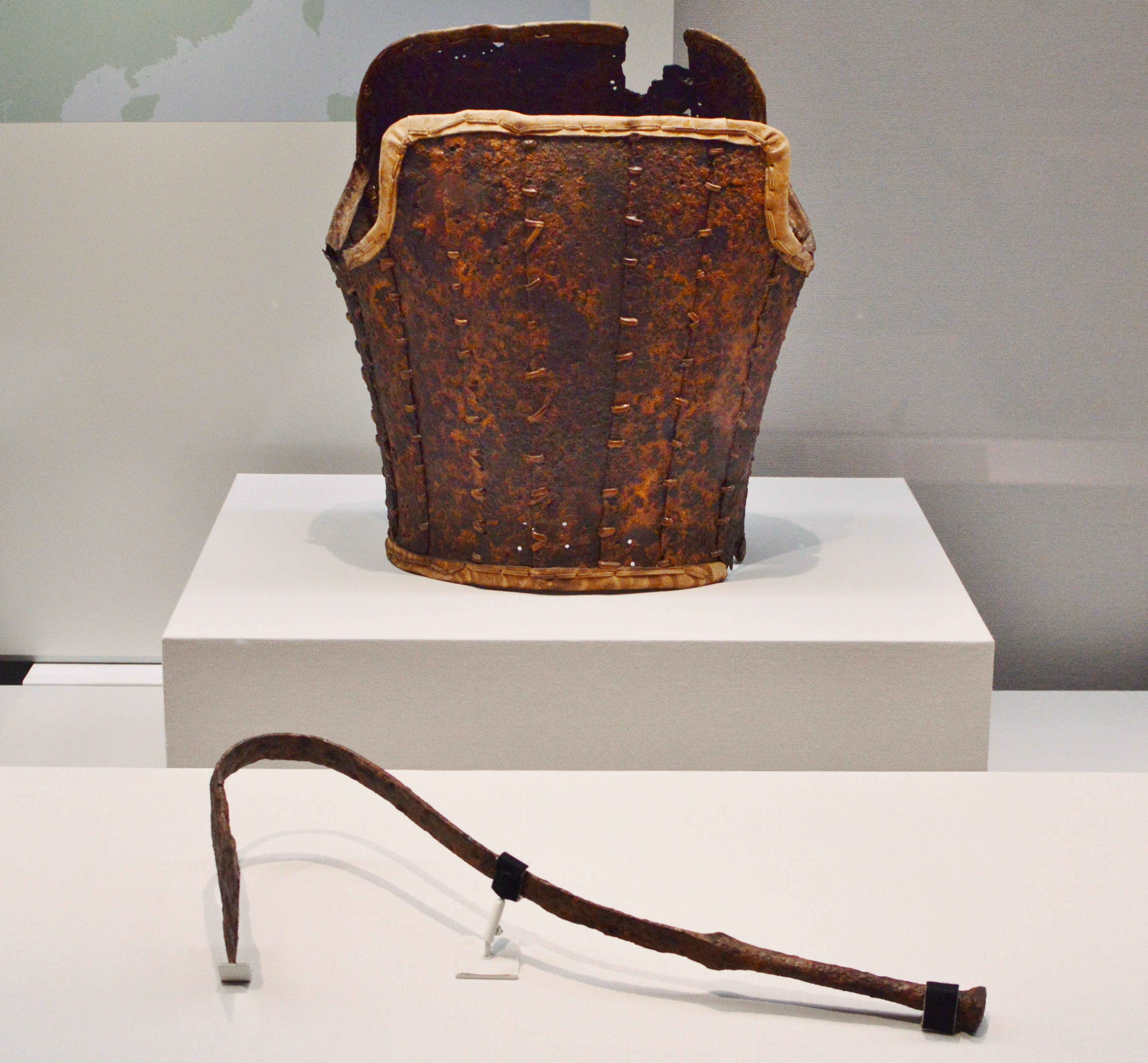 大丸山古墳出土 革綴短甲・有柄鉄斧